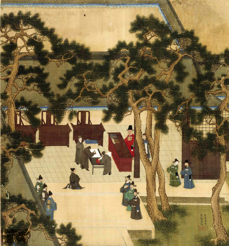 玉堂視篆，時年五十